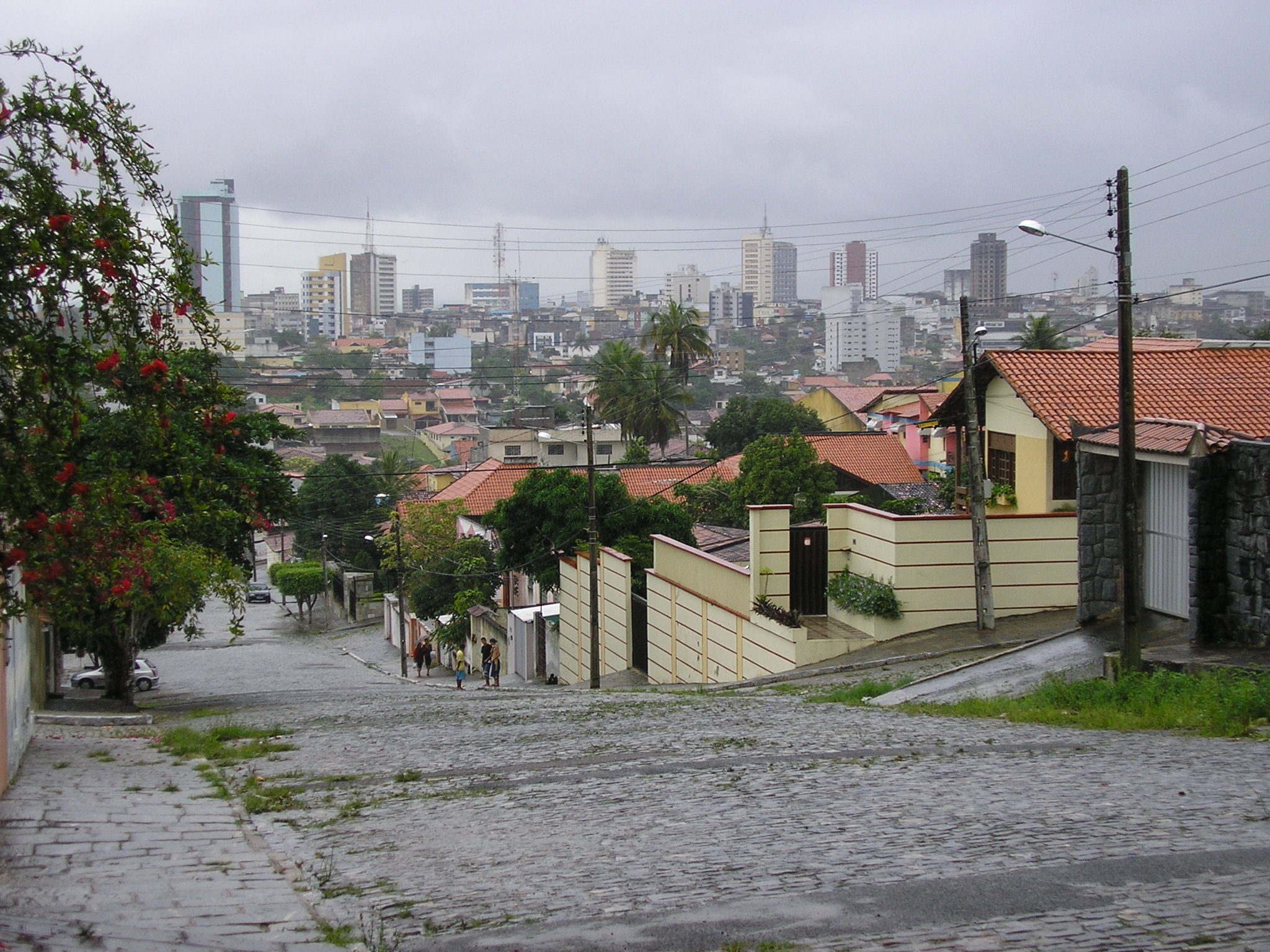 Uma_Rua_do_Alto_Branco, Campina Grande, Brasil.